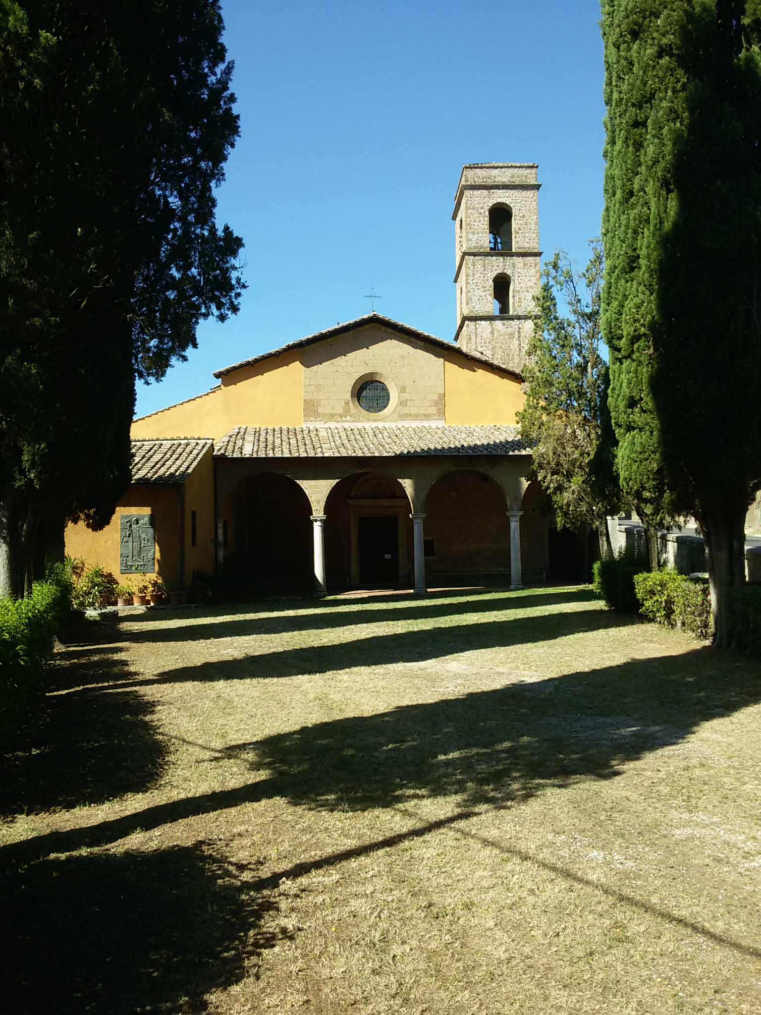 Chiesa di San Famiano, Gallese (VT)